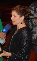 MC Rappórter entrevista Débora Bloch no II Festival Paulínia de Cinema.